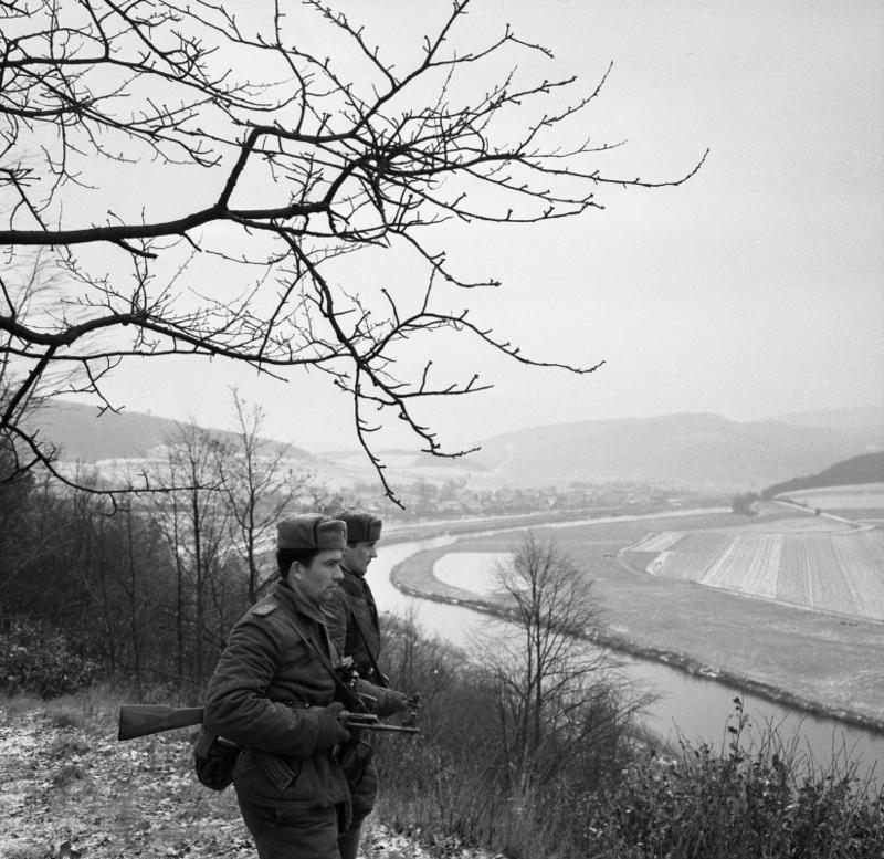 DDR-Grenzsoldaten auf Posten oberhalb der Werra Zentralbild Kohls 18.2.1965 Zum Jahrestag der Nationalen Volksarmee Zum 9. Mal jährt sich am 1. März 1965 der Tag der Nationalen Volksarmee. Aus diesem Anlaß besuchten wir eine Grenzeinheit im Bezirk Erfurt, um über den verantwortungsvollen Dienst und das Leben unserer Soldaten zu berichten. UBz.: Grenzposten bei der Ausübung ihres Grenzdienstes am Flußlauf der Werra. Postenführer Gefreiter Günter Hötzel aus Leubsdorf, Bezirk Karl-Marx-Stadt (vorn) und Soldat Manfred Barnack aus Kömlitz, Bezirk Cottbus. (Ergänzung der Bildbeschreibung: Der Standpunkt der Grenzsoldaten ist vermutlich der Anstieg von Lindewerra zur Junkerkuppe, der Blick geht über das Werratal mit Lindewerra zum bereits hessischen Solberg im Hintergrund)